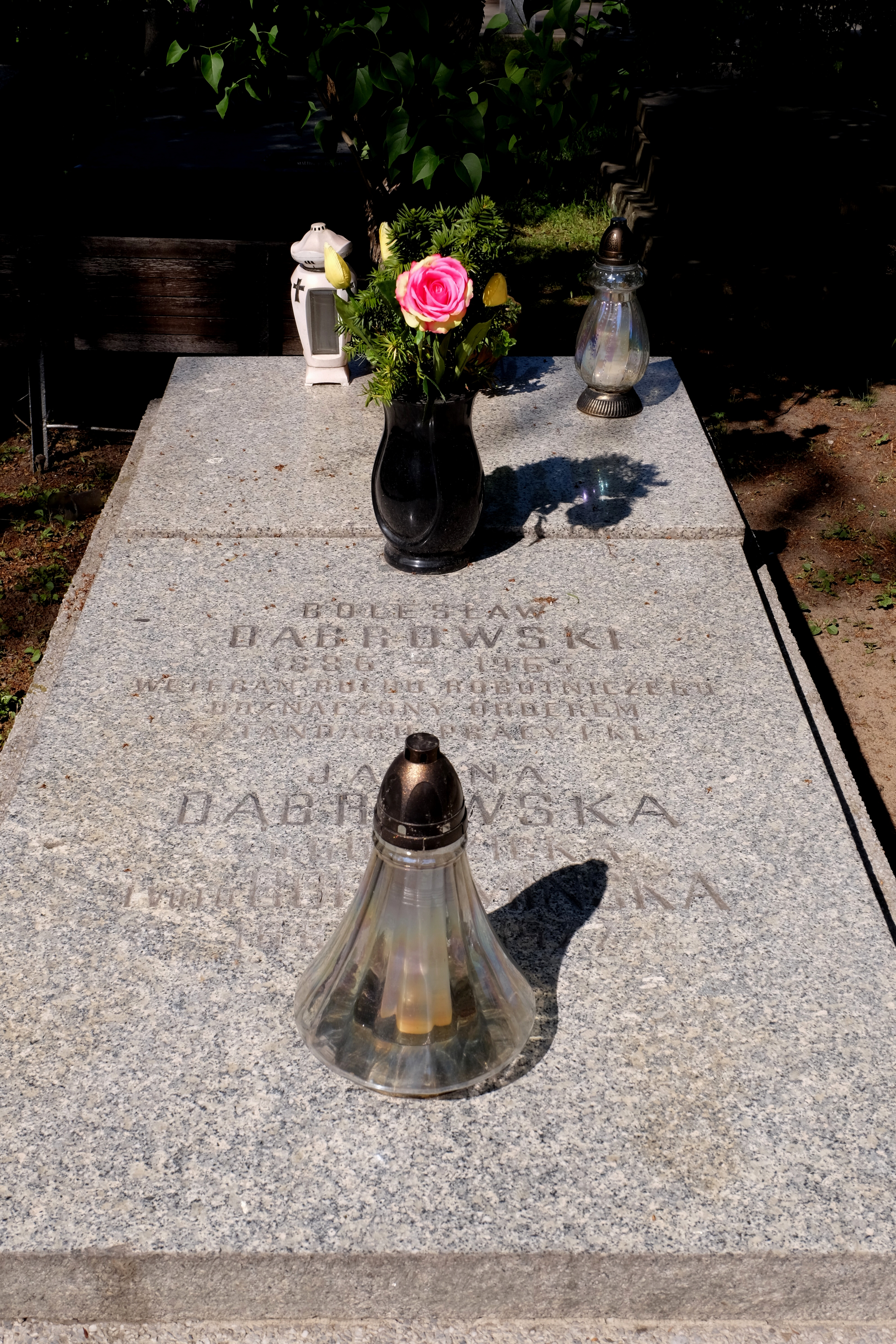 Grób działacza komunistycznego Bolesława Dąbrowskiego na Cmentarzu Wojskowym na Powązkach w Warszawie